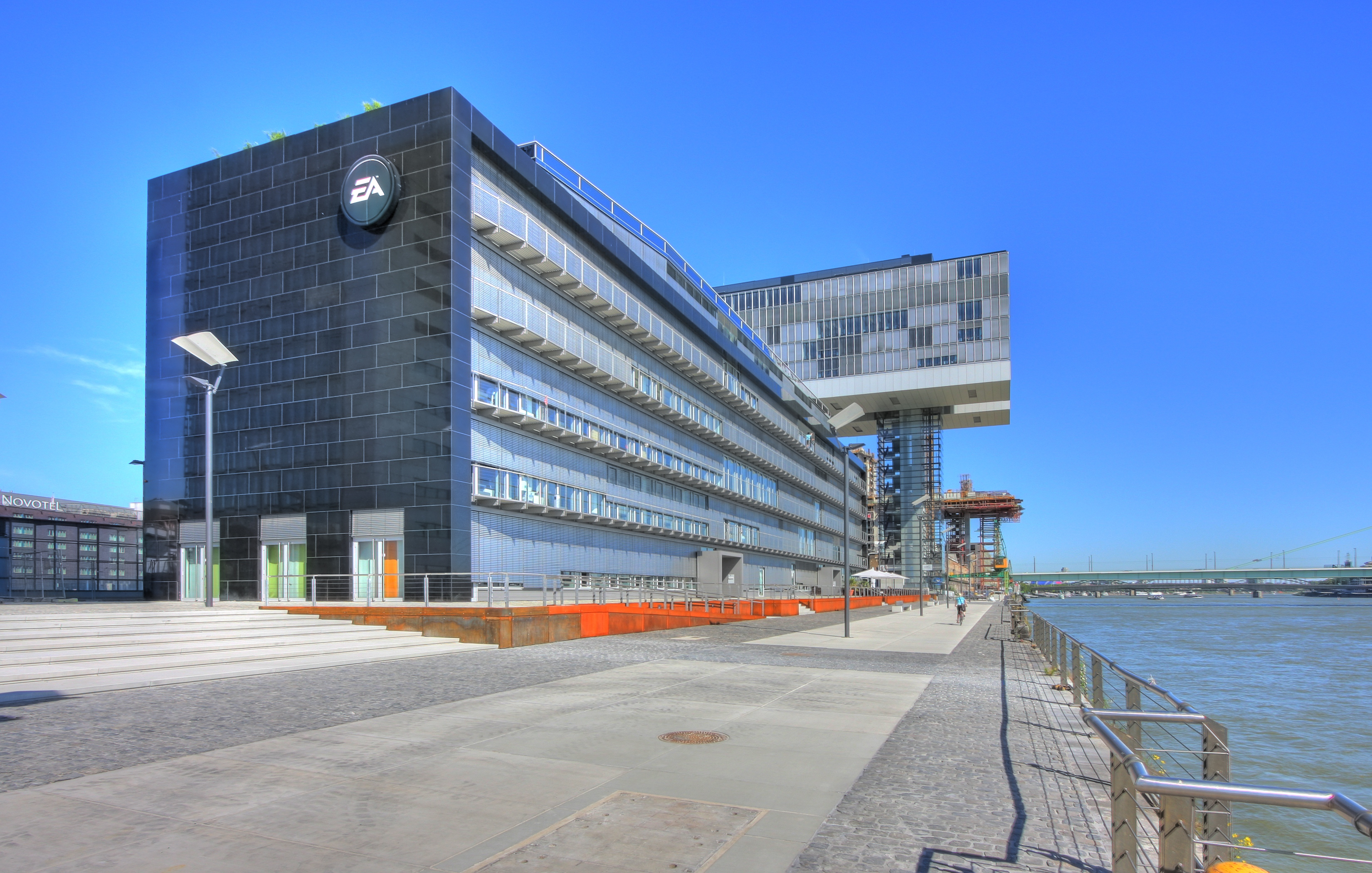 Rheinauhafen Köln. Rheinseite mit Rheinpromenade „Auf der Hansewerft“. Bürogebäude: „The Bench“. Architekt: Bahl + Partner, Hagen. Baujahr: 2007 Deutschlandzentrale von Electronic Arts. Im Hintergrund das mittlere der 3 Kranhäuser: „Kranhaus1“